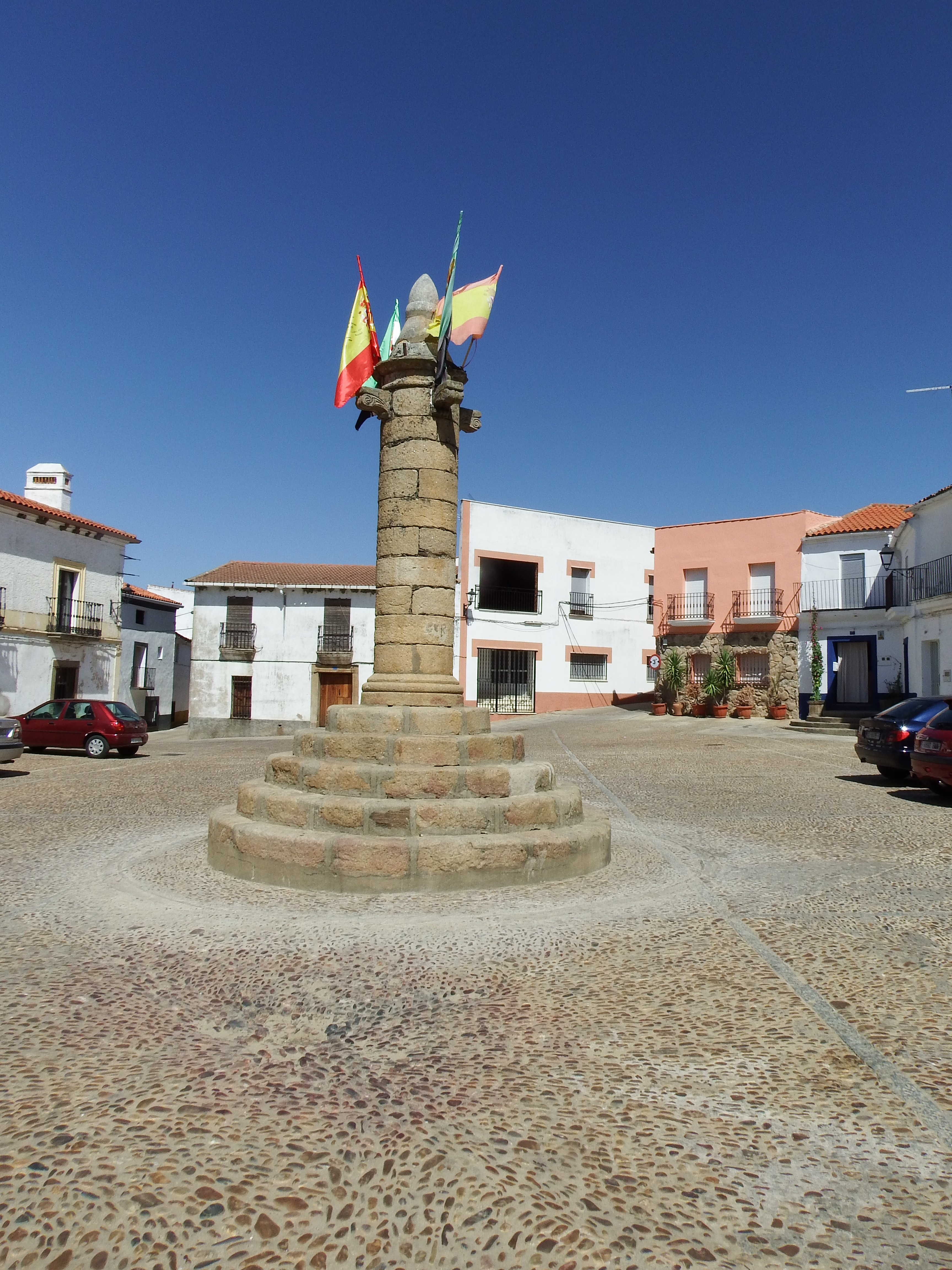 Garciaz